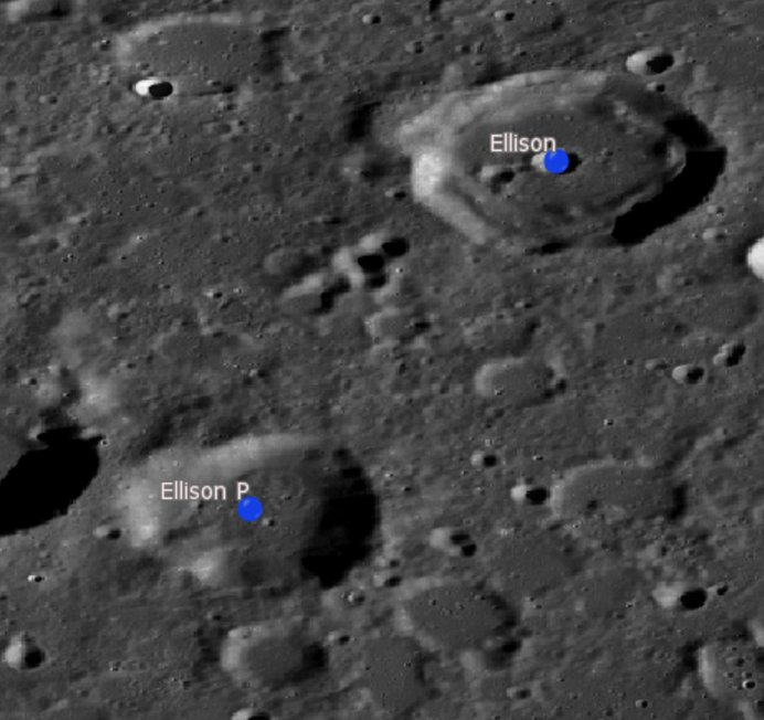 Cráter lunar Ellison. Localización. (Imagen LROC)